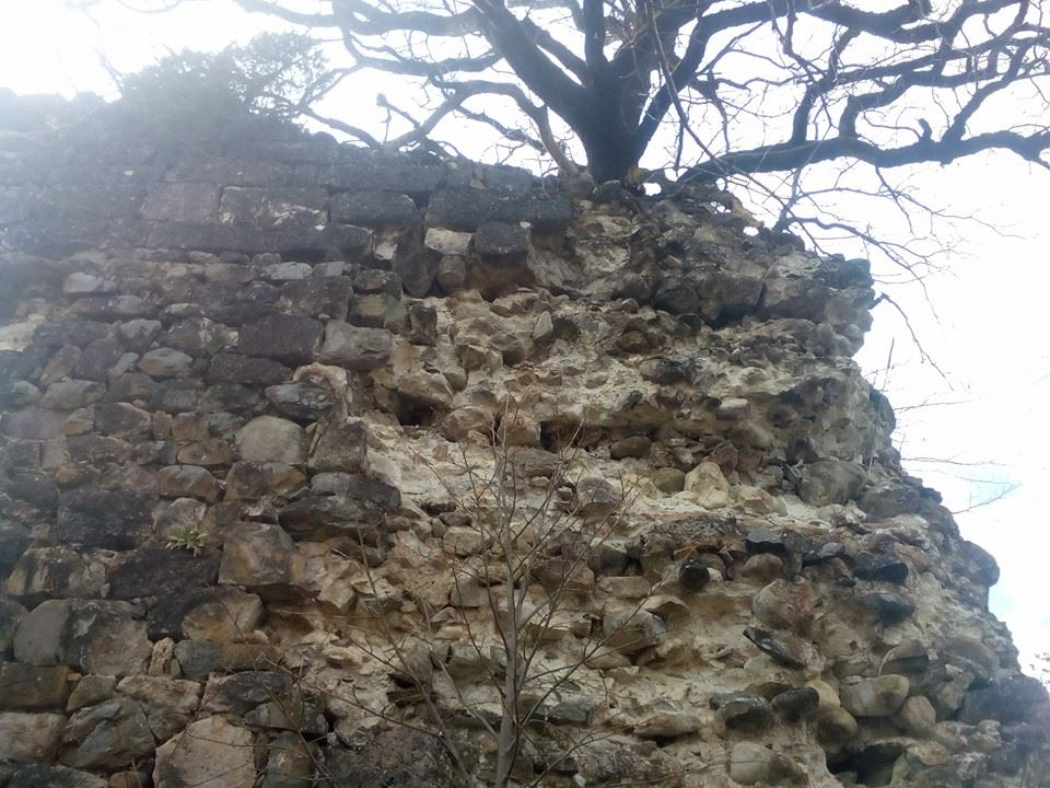 ციხე